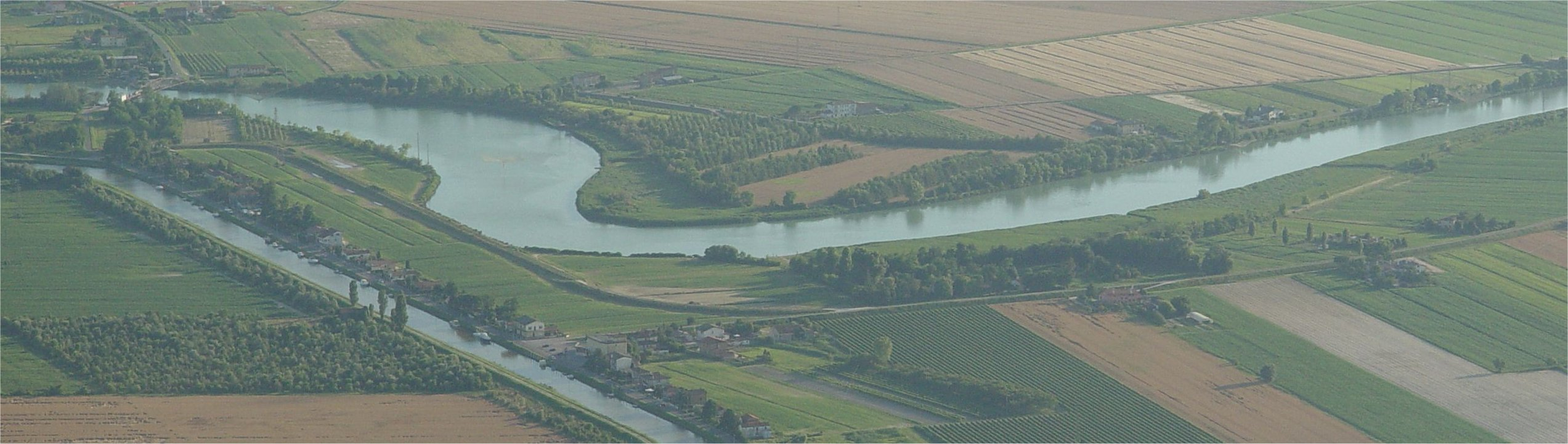 Foto del Piave e del revedoli a Eraclea vicino alle foci, vista aerea.